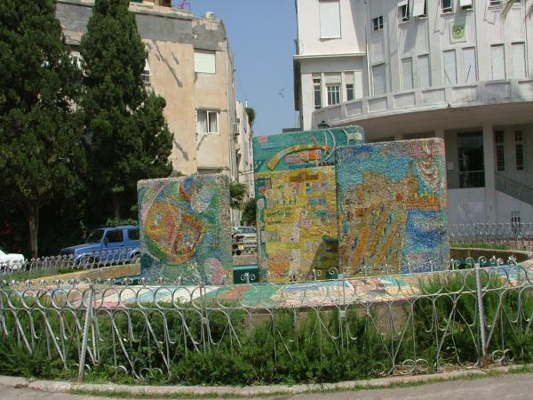 בת"א, רח' ביאליק מול בית העירייה הישן, מזרקת פסיפס שתוכננה ע"פ נחום גוטמן